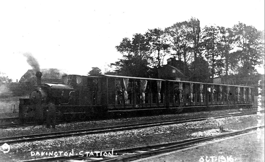 Davington Light Railway - No.1 - 0-6-0ST - metre gauge - built 1916 by Manning Wardle & Co., works No.1914